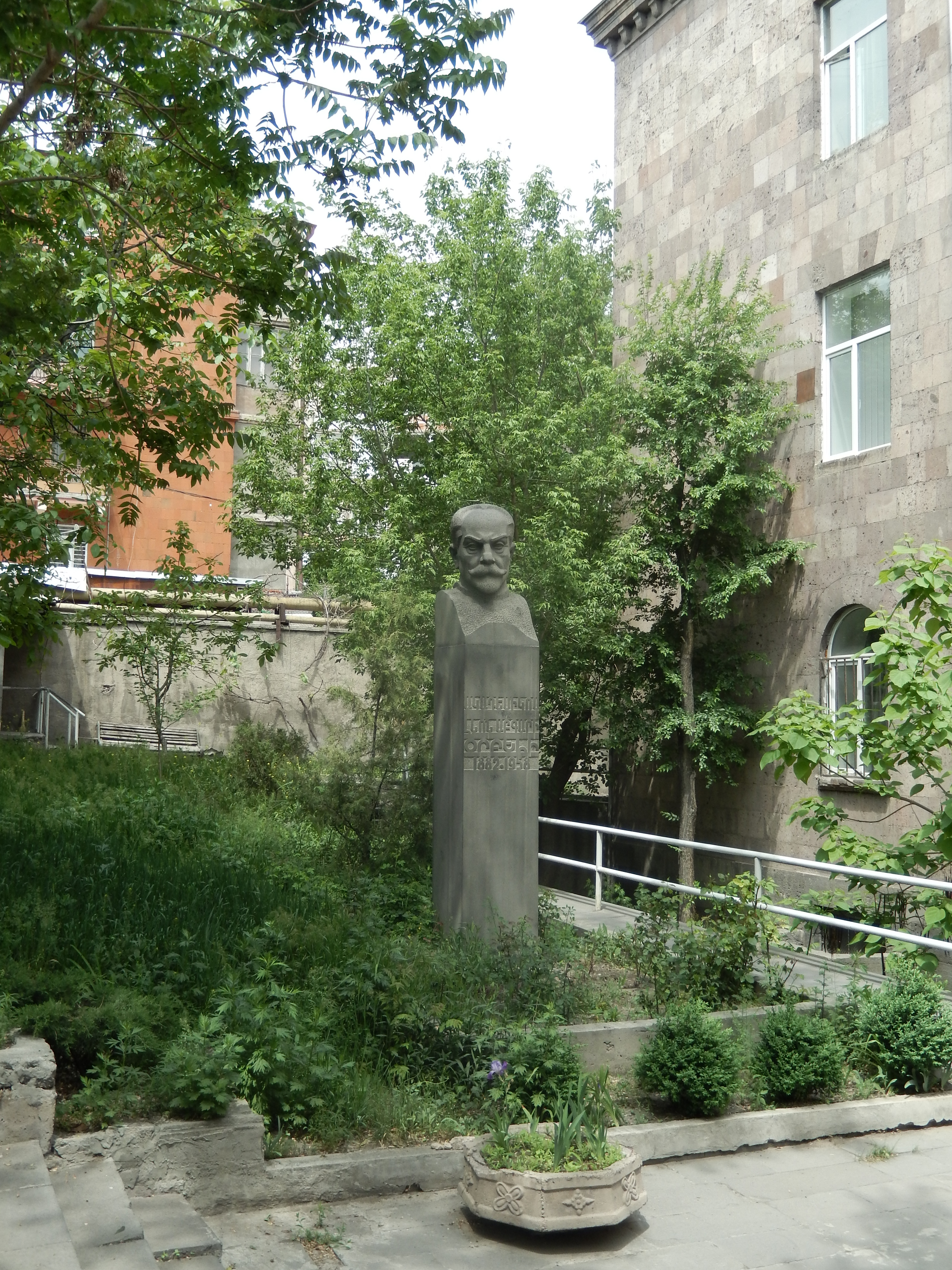 Լևոն Օրբելու կիսանդրին համանուն ֆիզիոլոգիայի ինստիտուտի առջև